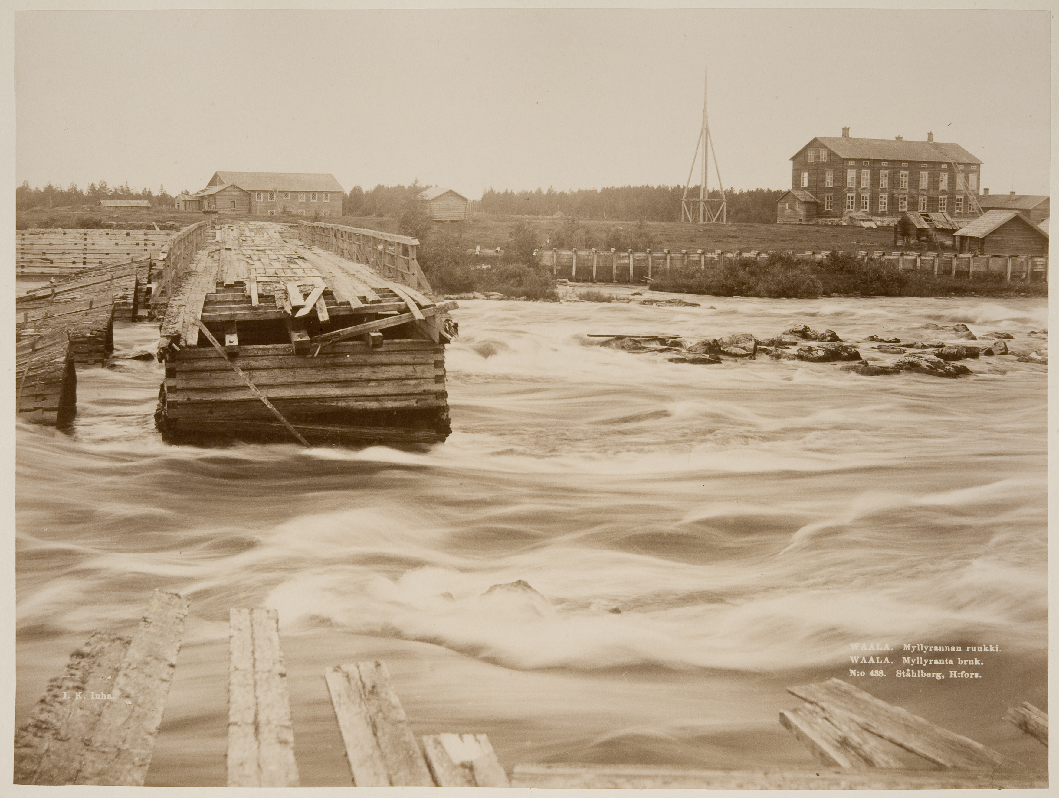 Carl Gustaf Bergbomin vuonna 1838 perustama Myllyrannan ruukki Niskan kylässä.